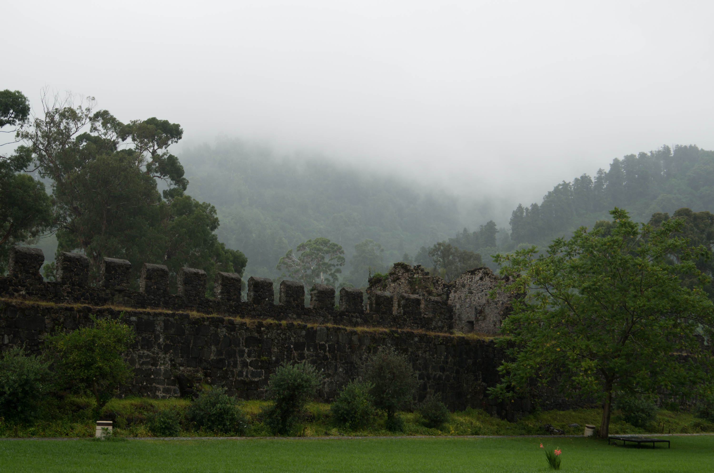 Крэпасць Гоніа (Грузія)